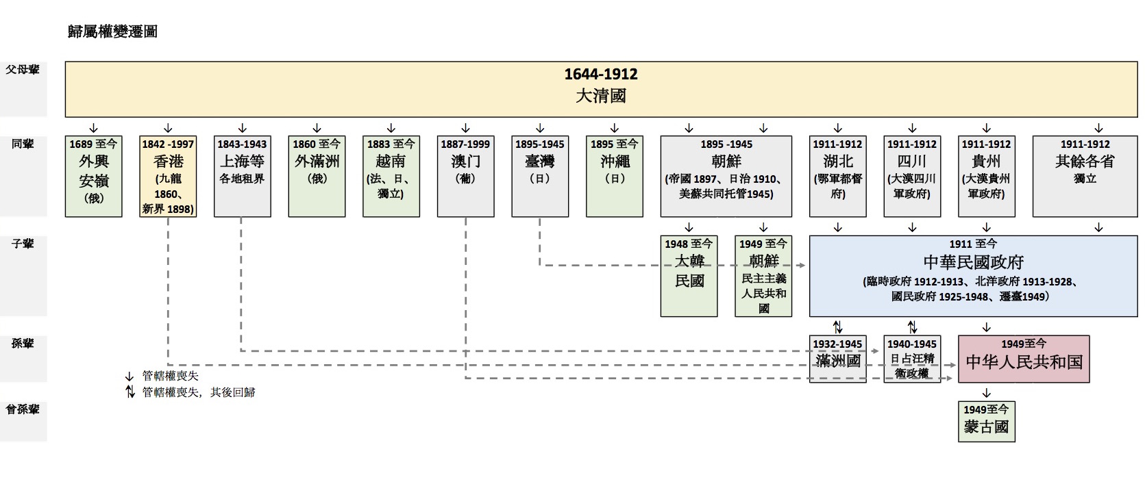 粵語: 清朝以來政治歸屬權演變